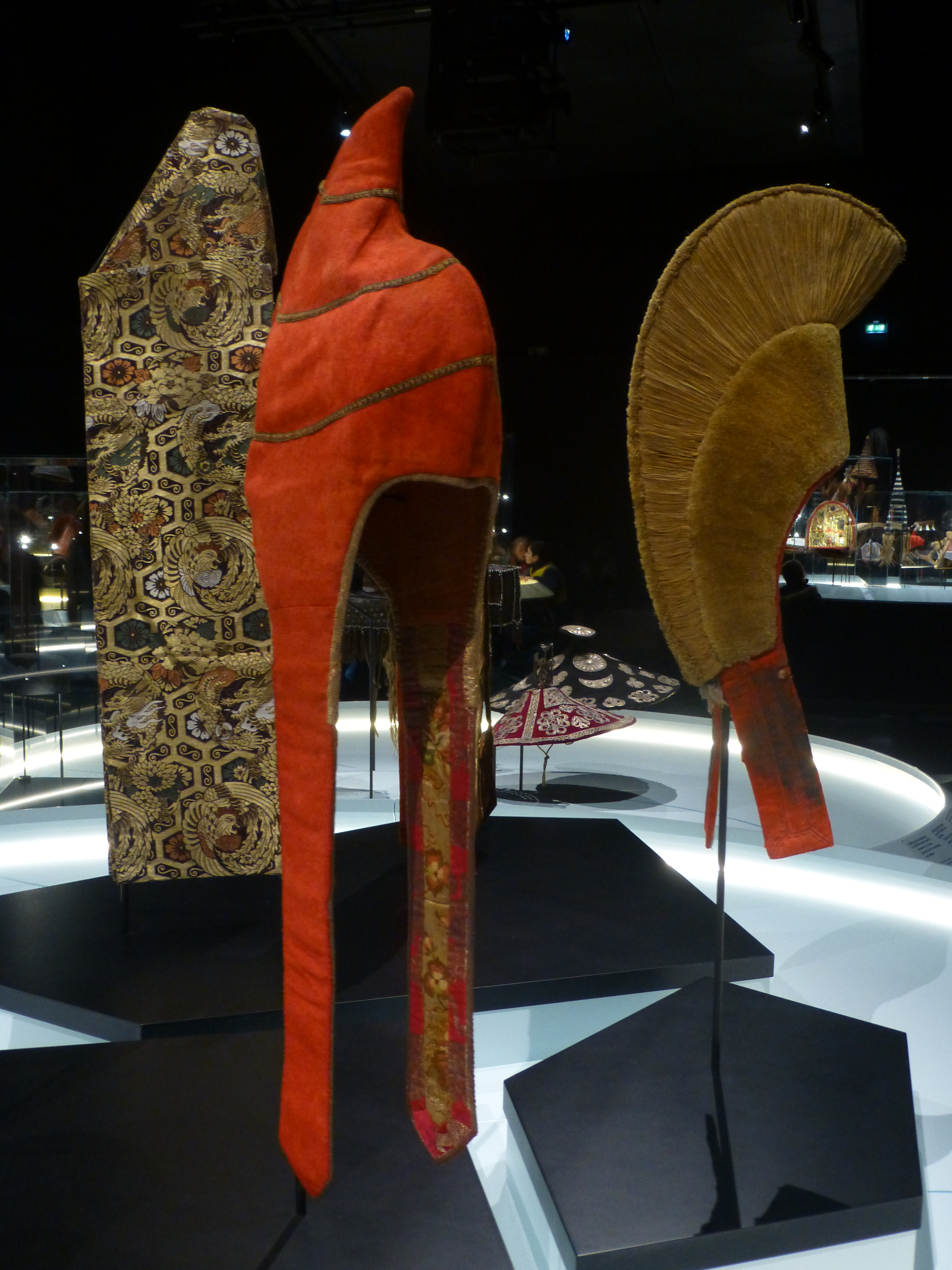 Au centre, en rouge: Coiffe des « Pandit » de l'école des « Sakyapa » (pann-sha), XXe siècle, Musée des Confluences, Lyon, France (fév. 2020). Cette coiffe de l'école bouddhiste Sakyapa (« Terre pâle ») était réservé aux hauts dignitaires religieux. Le nombre de filets d'or atteste l'approfondissement de l'étude des cinq savoirs (rig pa).